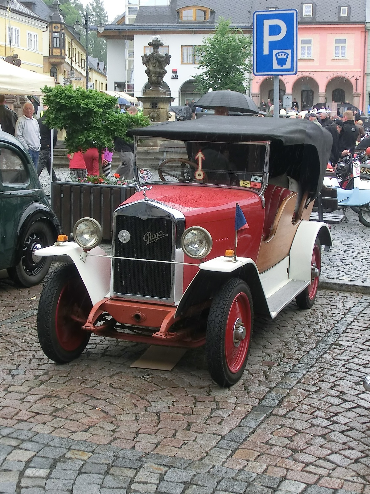 Jilemnice, akce "tatra v Českém ráji 2014".